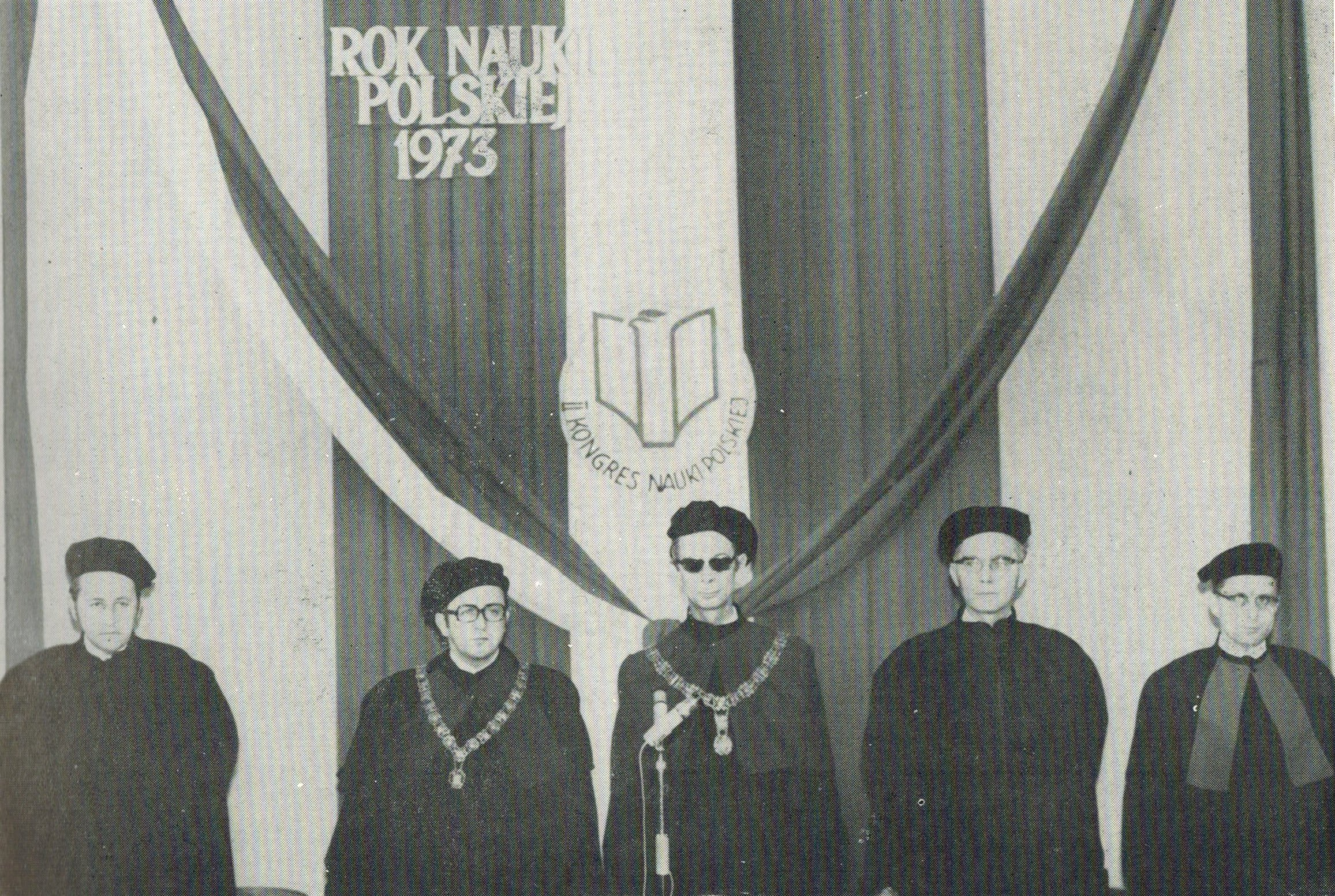 1973 pracownicy AMB na II Kongresie Nauki Polskiej